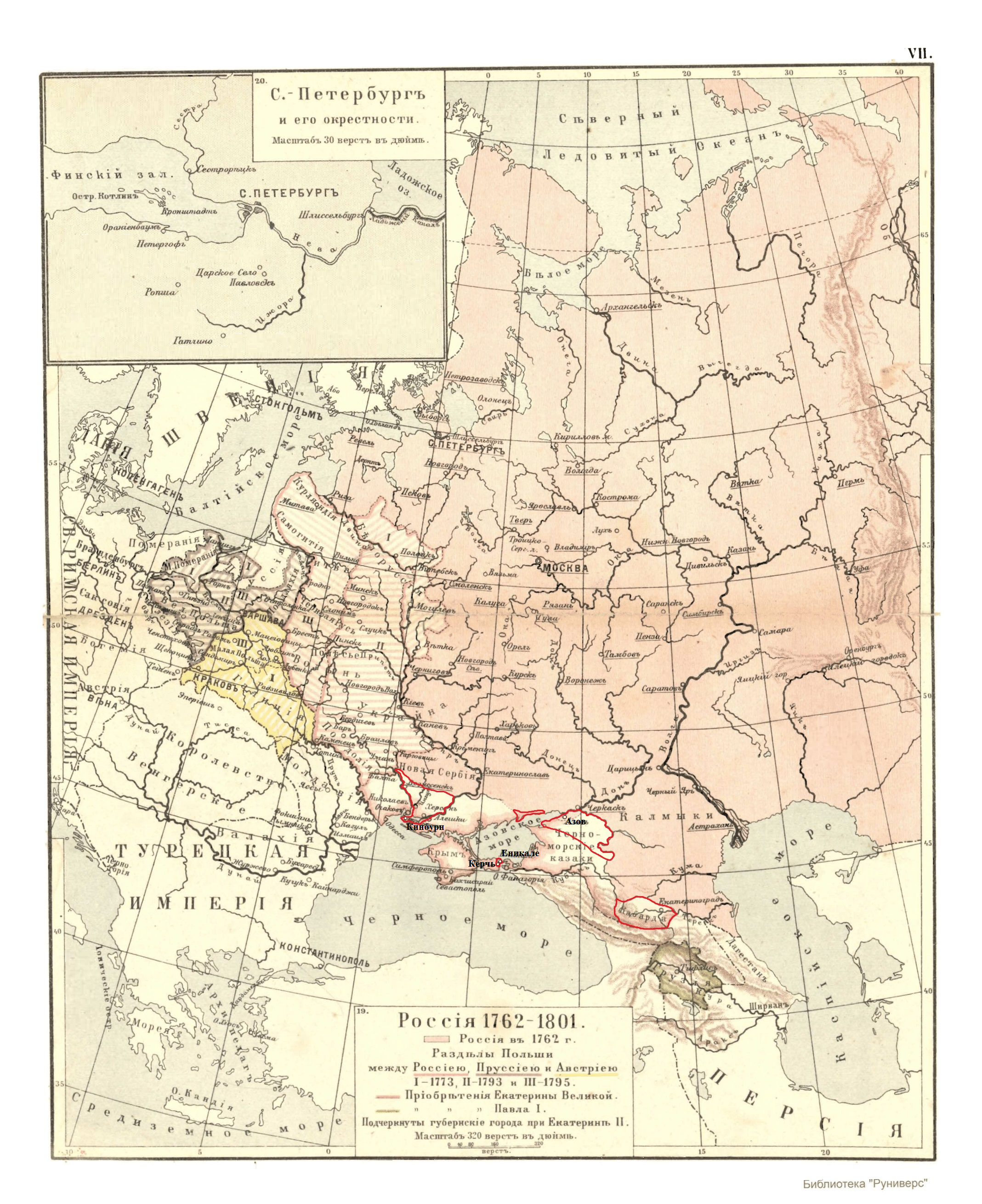 Карта Российской империи с указанием территориальных приобретений по Кючук-Кайнарджийскому договору